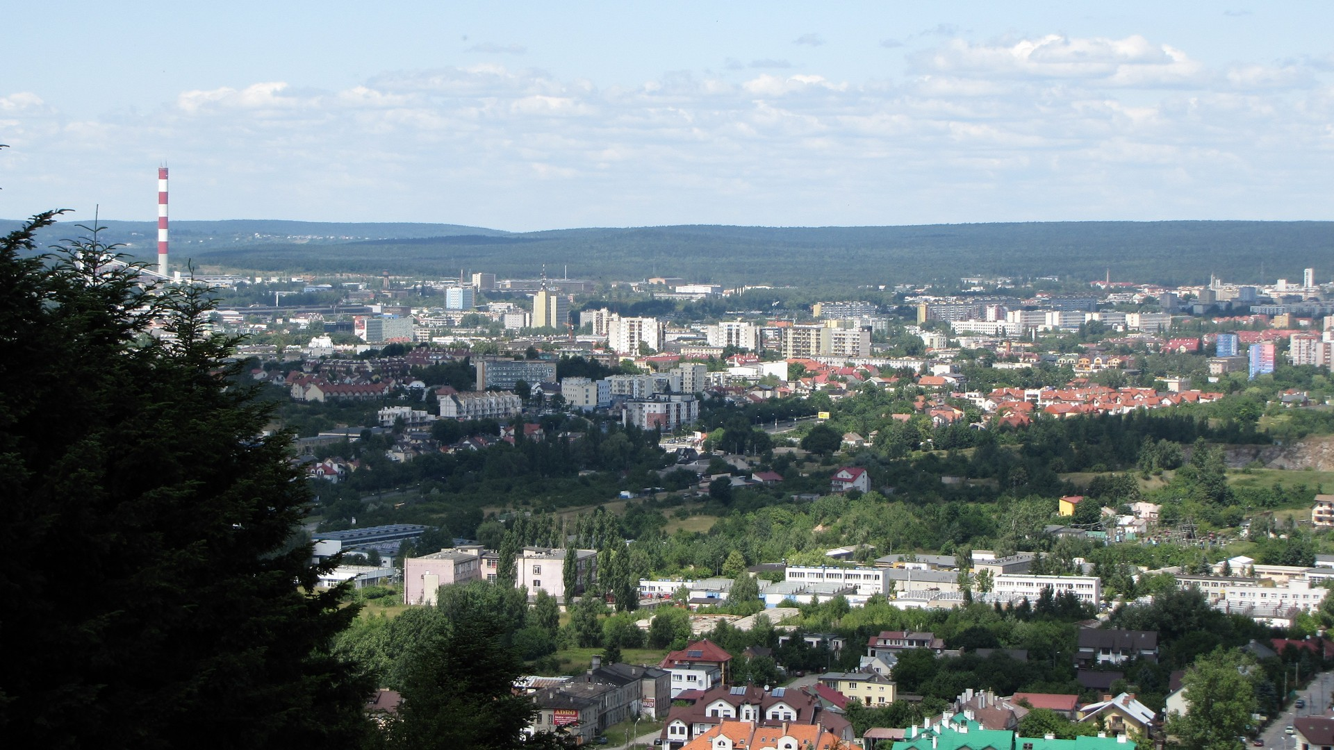 Widok w kierunku pn-zach.